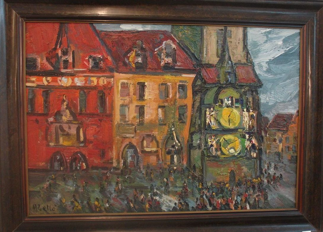 Pintura de la plaça principal de Praga